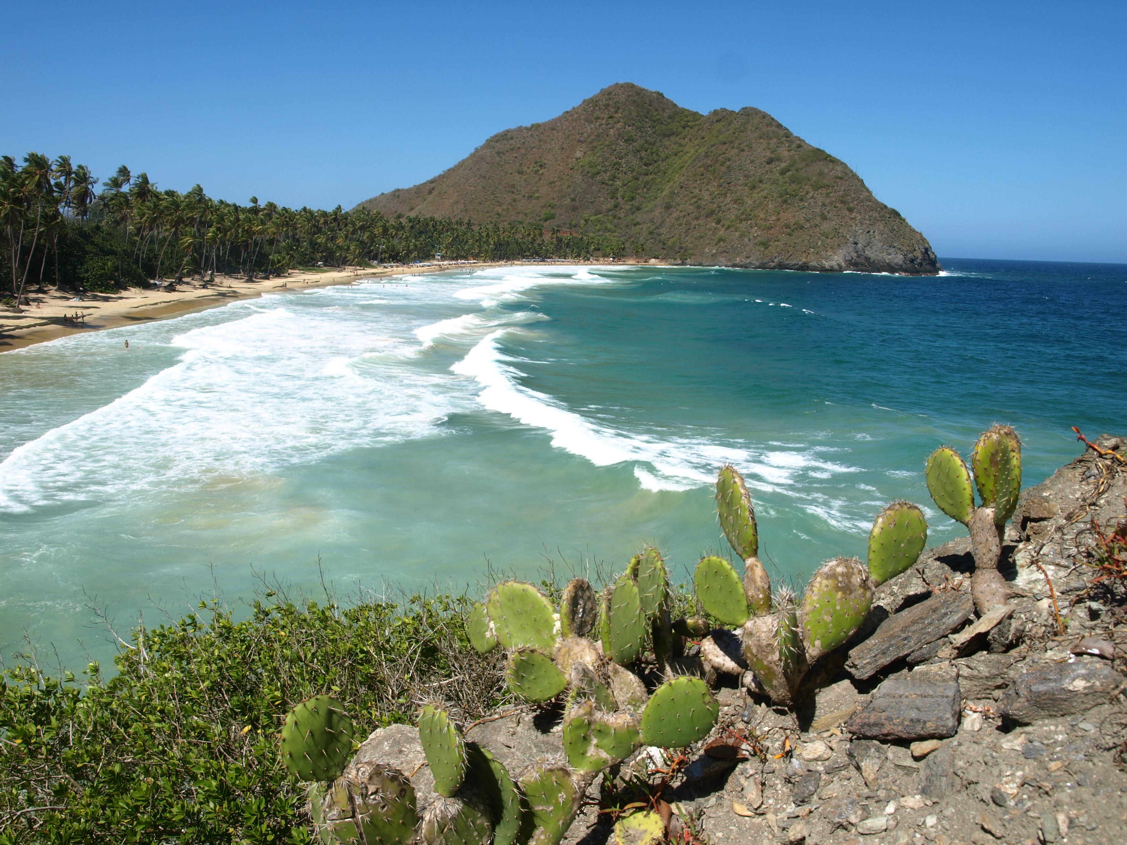 DISFRUTO DESDE OTRO ANGULO